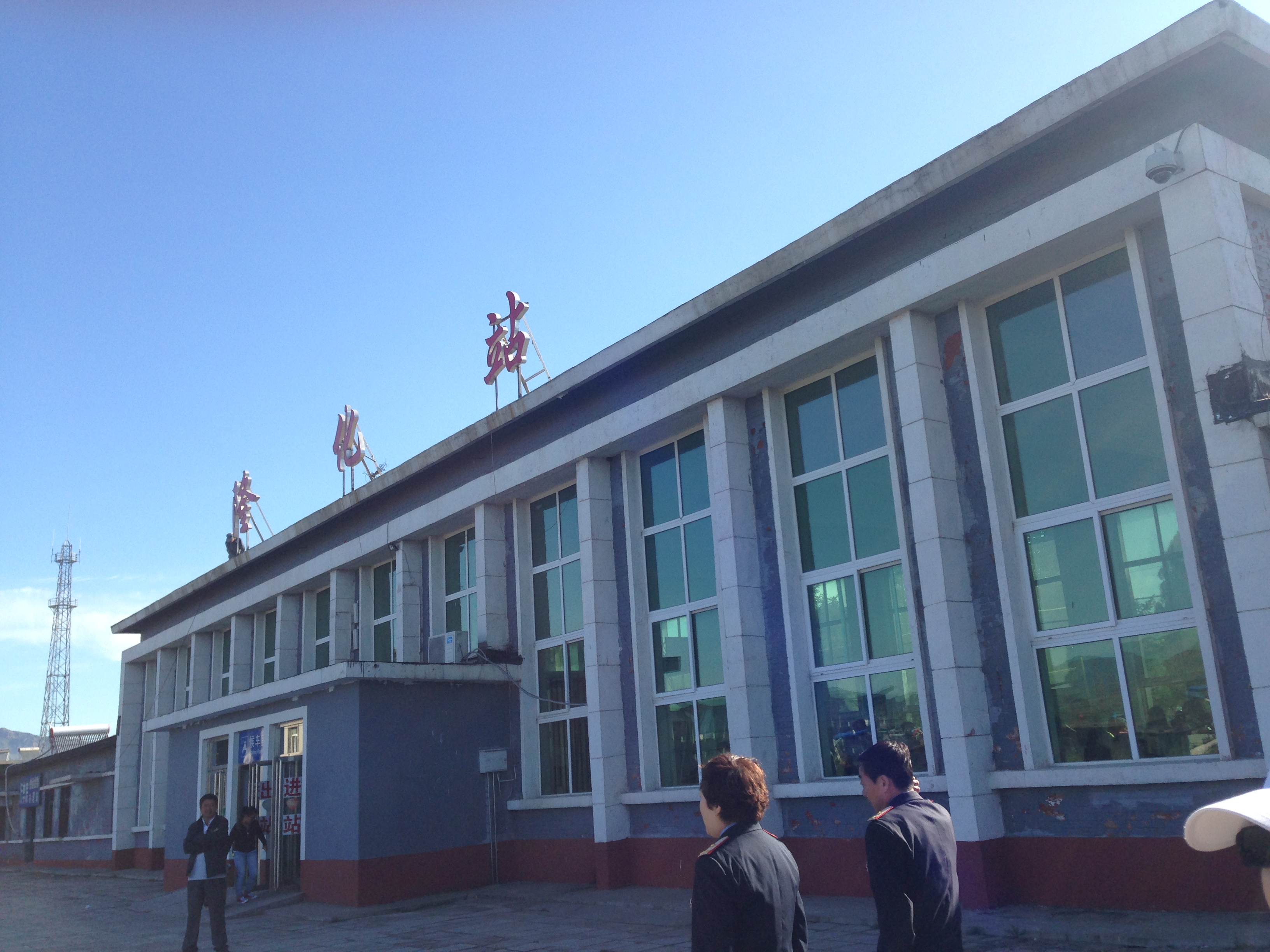 中文（中国大陆）: 隆化站站房